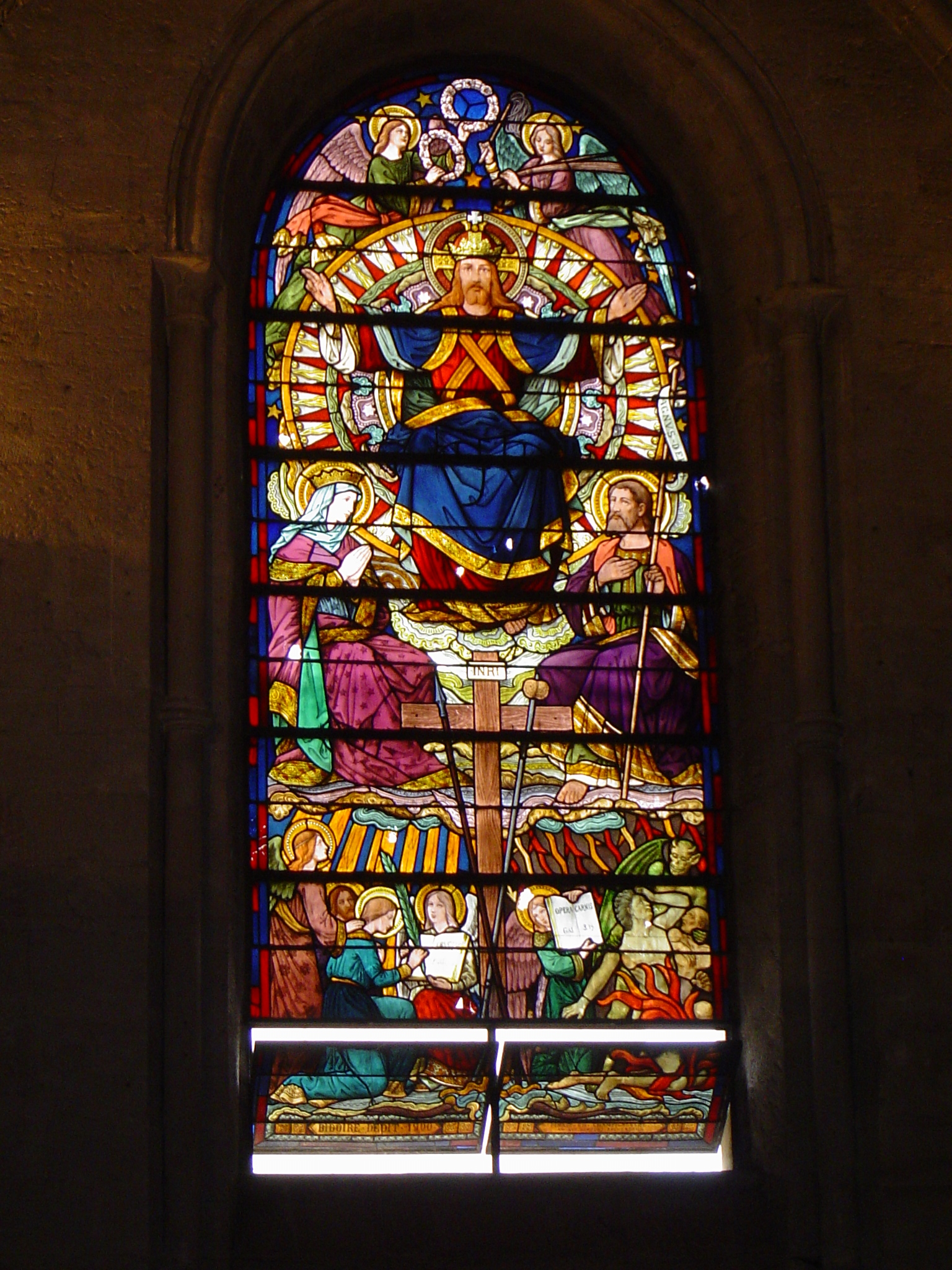 Antony - le vitrail central